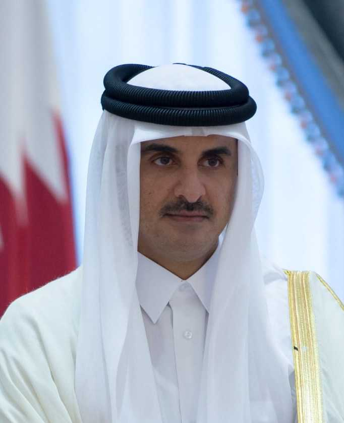 الشيخ تميم بن حمد آل ثاني Sheikh Tamim Bin Hamad Al Thani February 3, 2020. Doha - Qatar Picture by Ahmad Thamer Al Kuwari